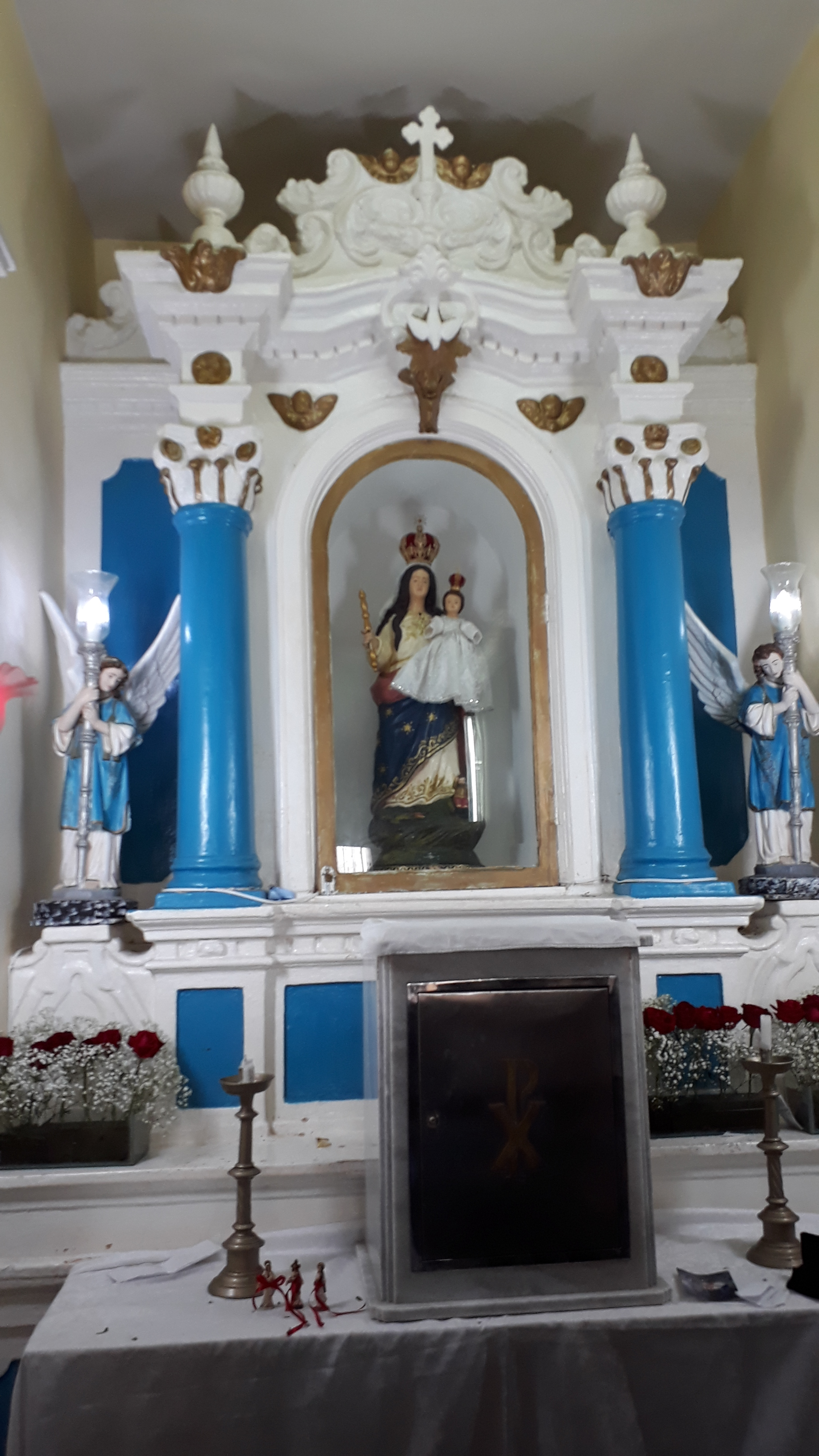 Capela da igreja Penha, em João Pessoa, na Paraíba